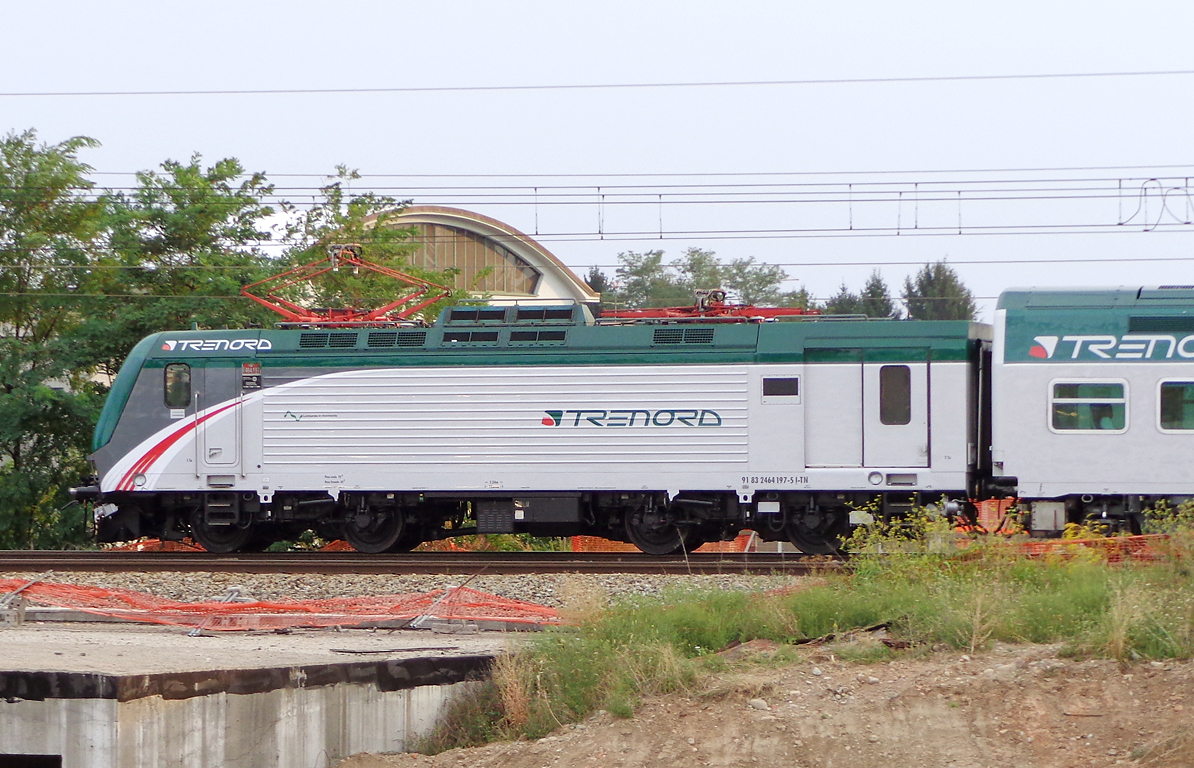 Locomotiva elettrica E.464.197 delle Ferrovie dello Stato in livrea Trenord, in transito presso Busto Arsizio.